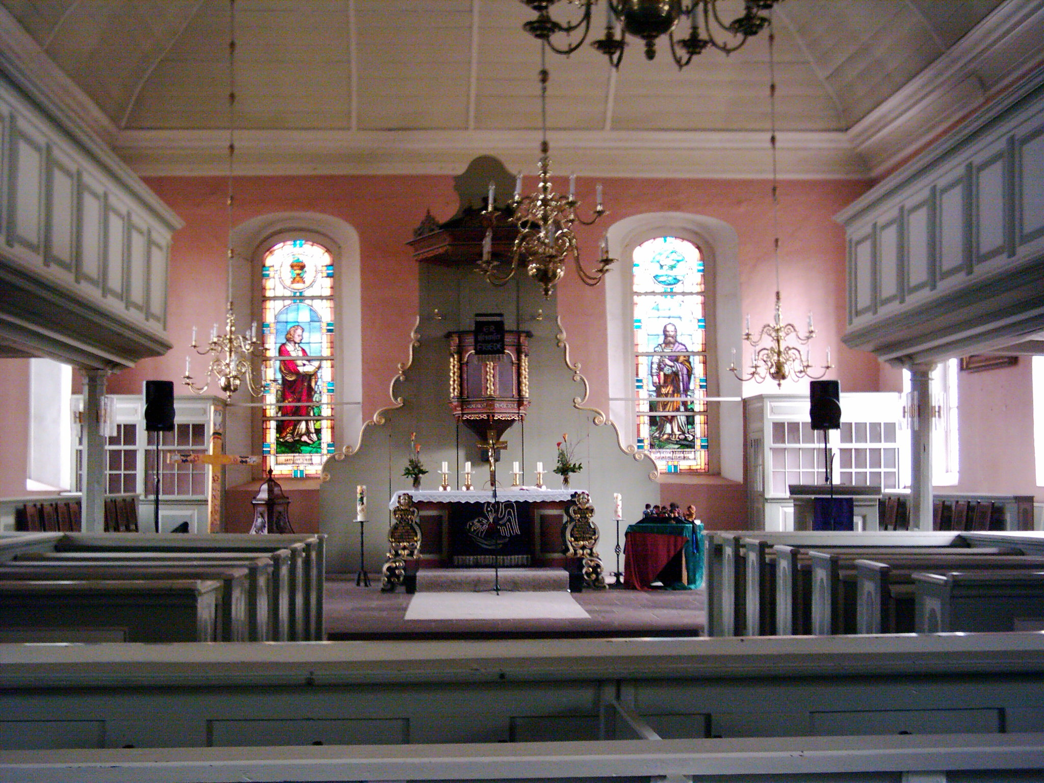 St. Nicolai Innen, von Westen